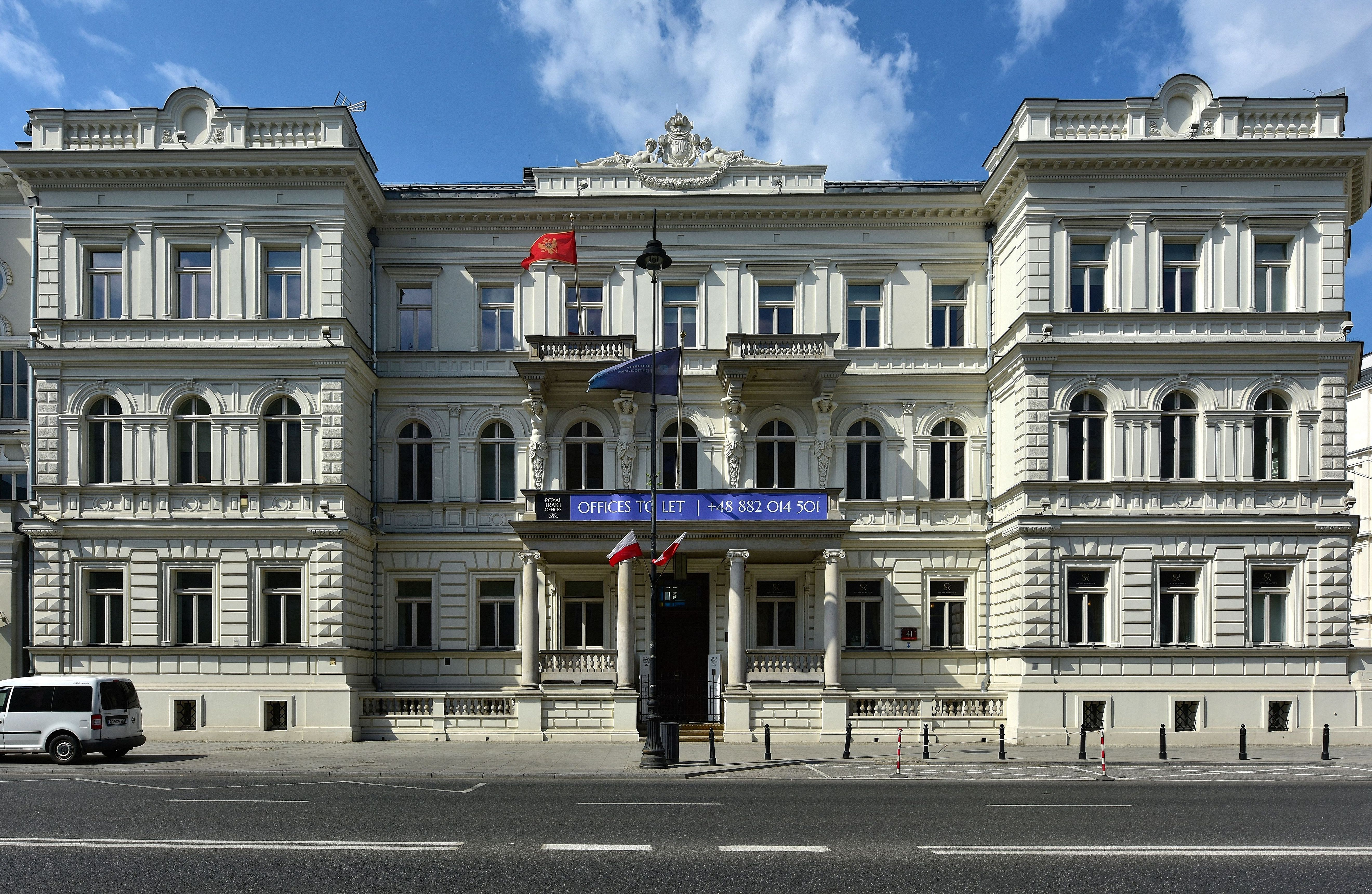 Kamienica w Alejach Ujazdowskich 41 w Warszawie